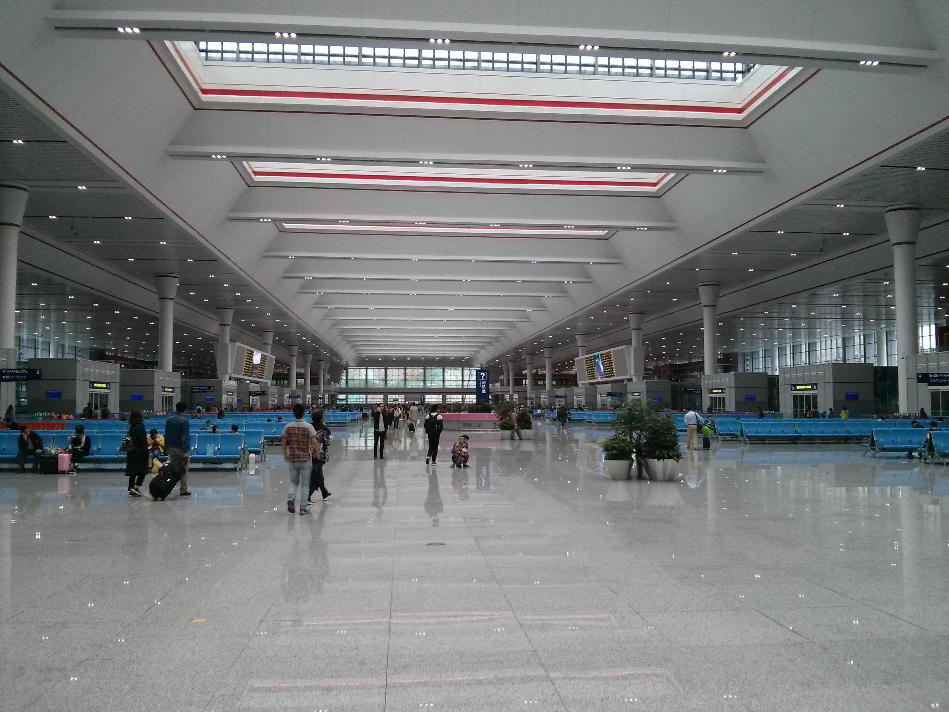 贵阳北站候车大厅